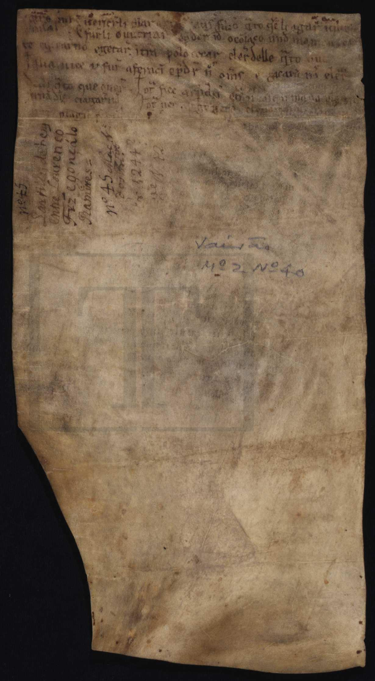 Noticia de Torto. Orde de San Benito, Mosteiro do Salvador de Vairão, mç. 2, doc. 40. 1 doc. (313 x 170 mm); perg. Reverso.